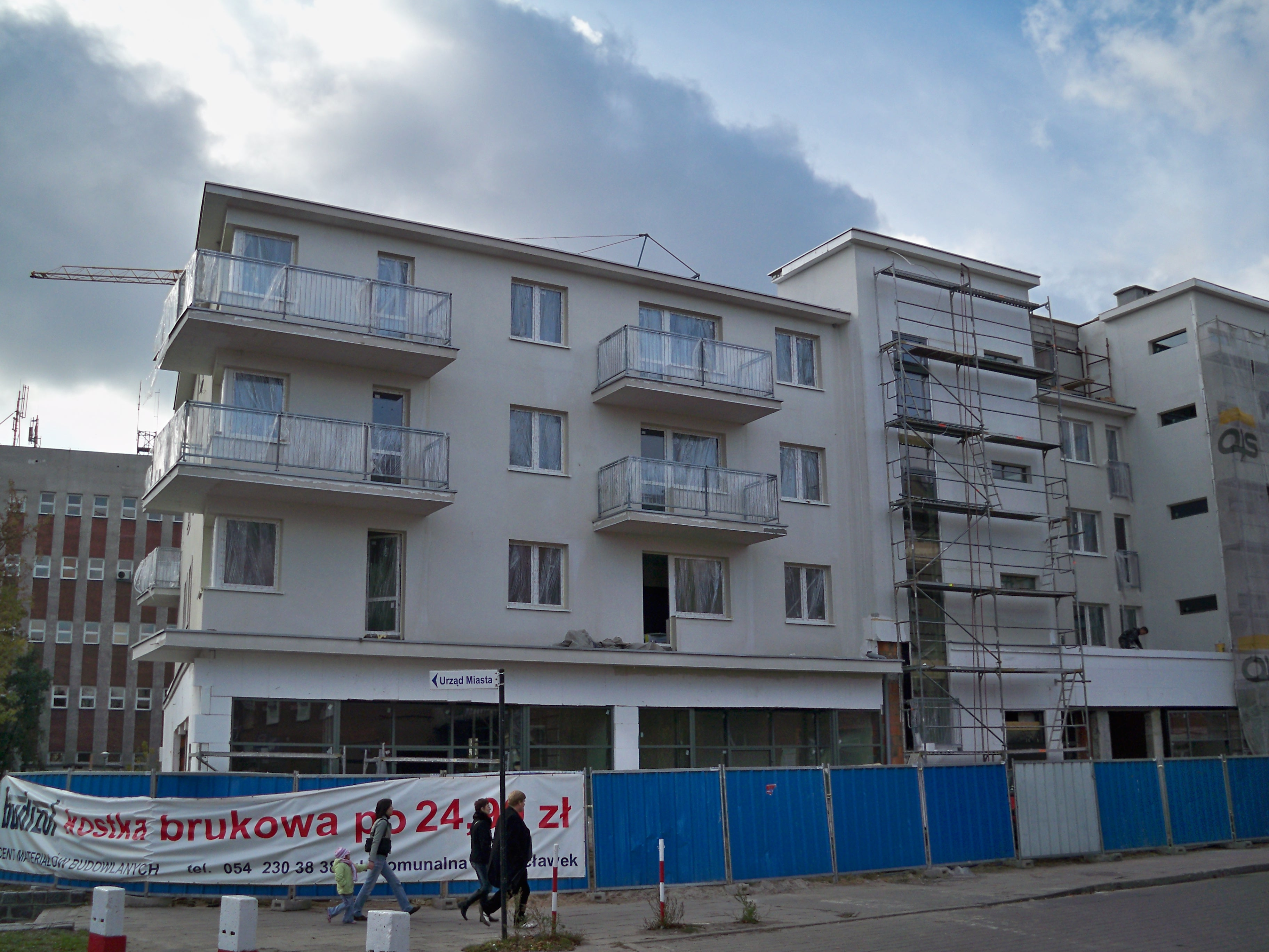 Budowa budynku przy ul. Królewieckiej 41/43 (2009 r.)